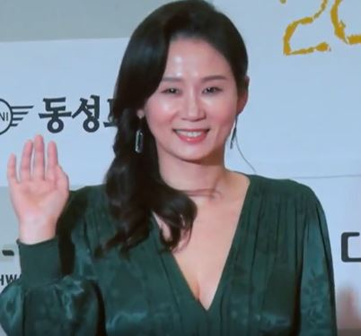 2018 제27회 부일영화상 레드카펫